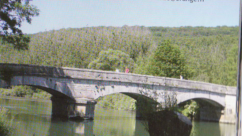 pont de pierre de la loue